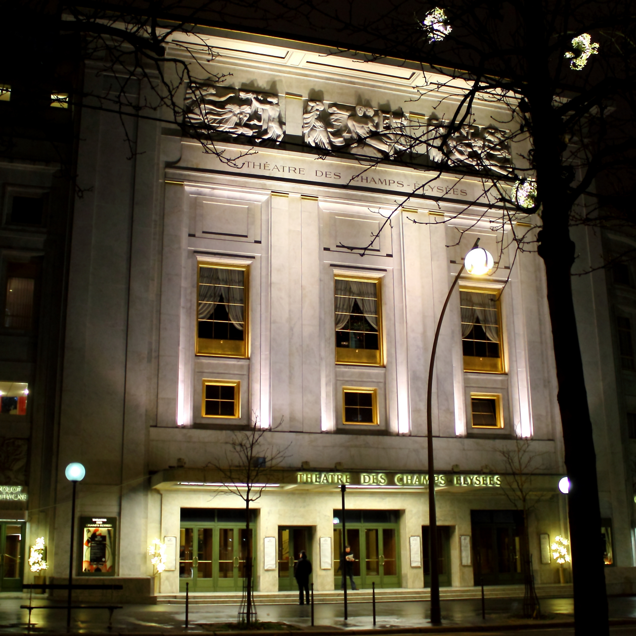 Théâtre des Champs-Elysées